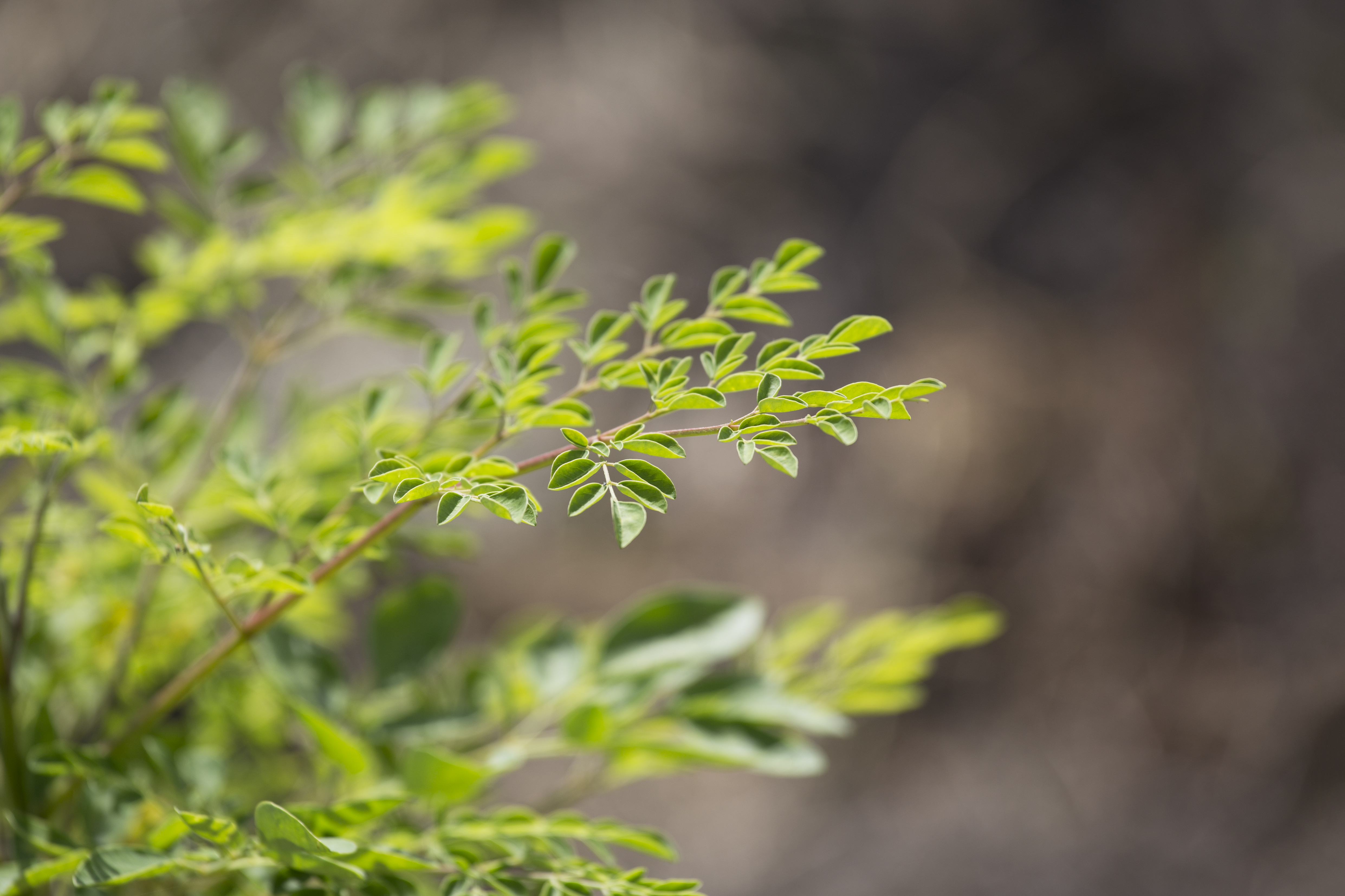 Ein junger Moringa oleifera Baum in Indien